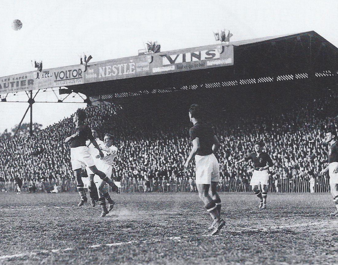 Match de la coupe du monde 1938 au stade Henri-Jooris de Lille qui voit la victoire de la Hongrie 2-0 face à la Suisse.